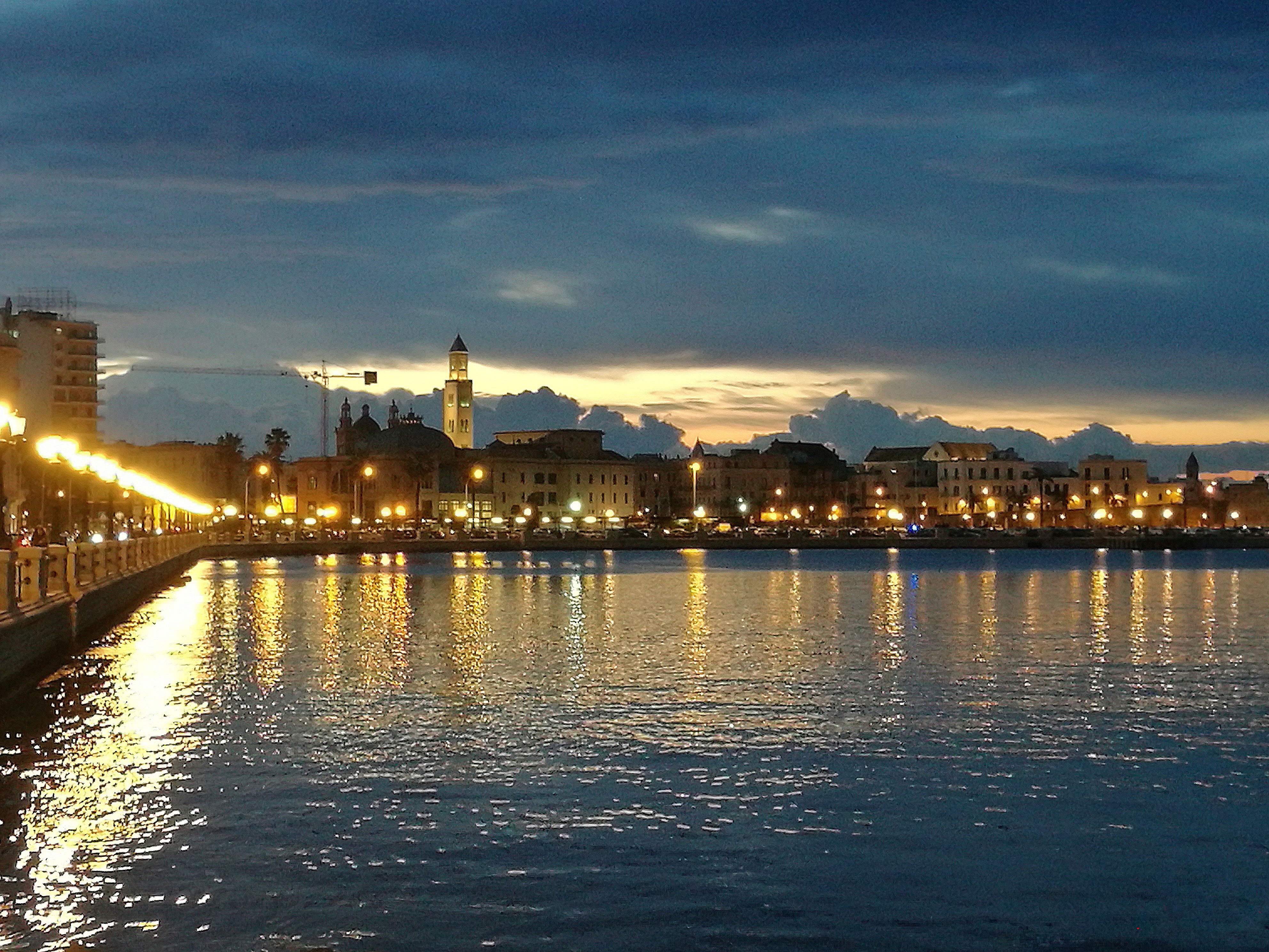 Lungomare Nazario Sauro This is a photo of a monument which is part of cultural heritage of Italy.